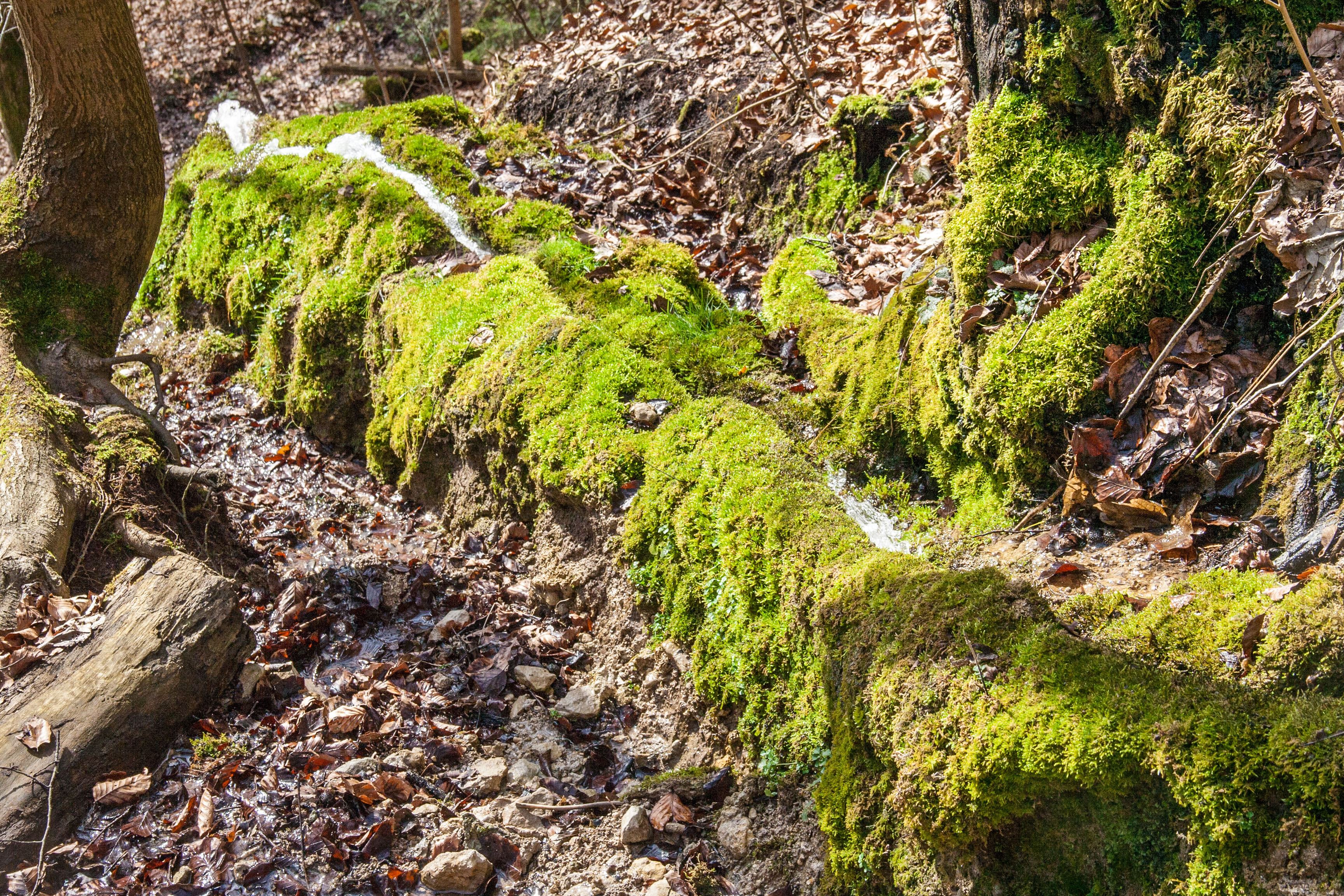 Steinerne Rinne, Düsselbach, Vorra, Nürnberger Land, Geschützer Landschaftsbestandteil, LSG Nördlicher Jura